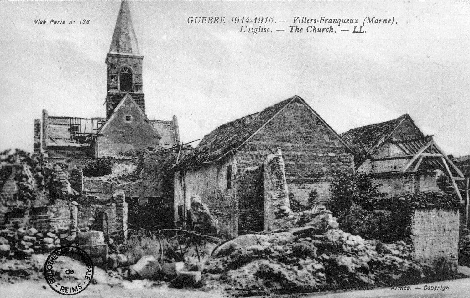 sur une vue ancienne.